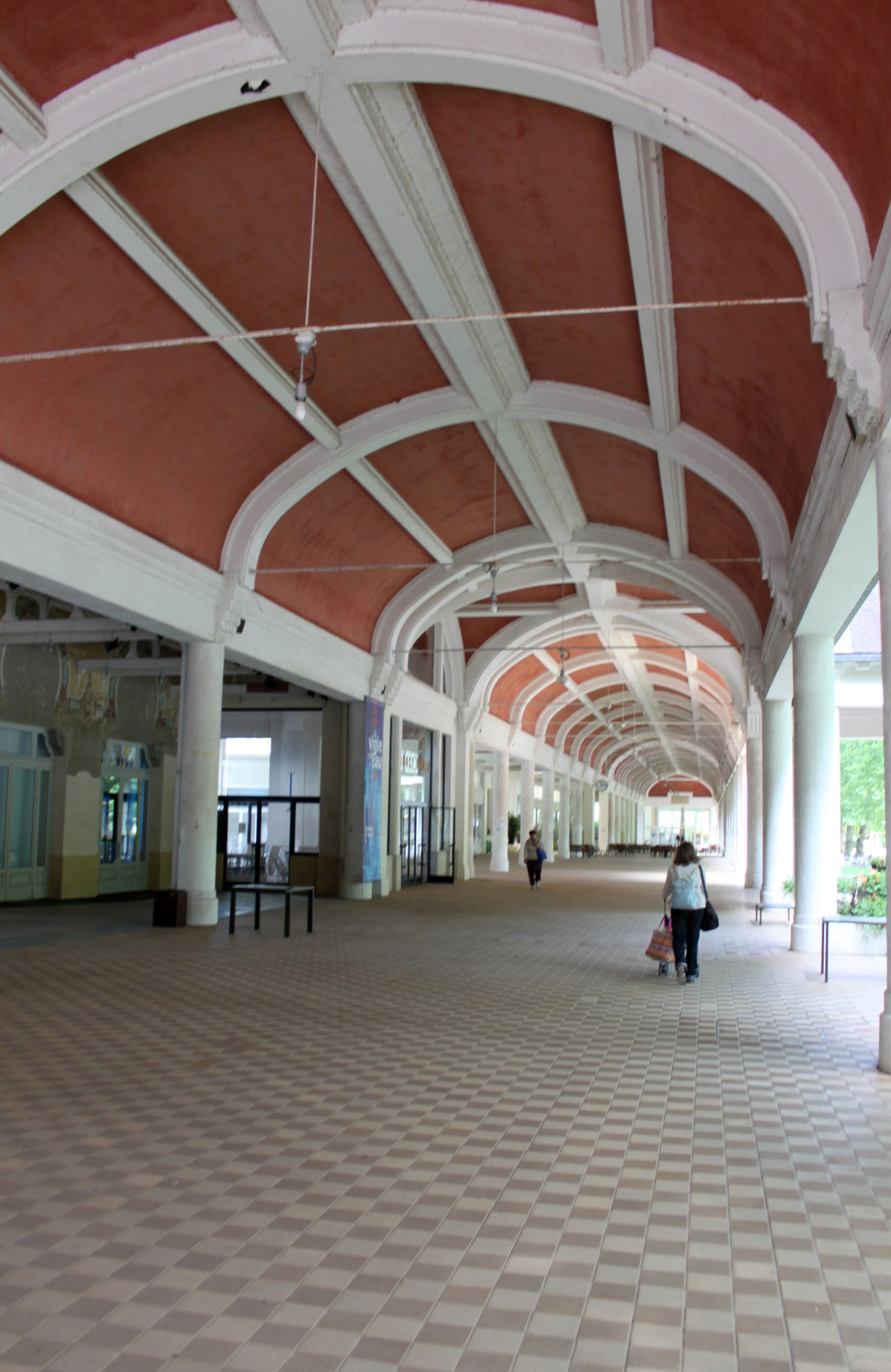 Vittel, Lorraine, France